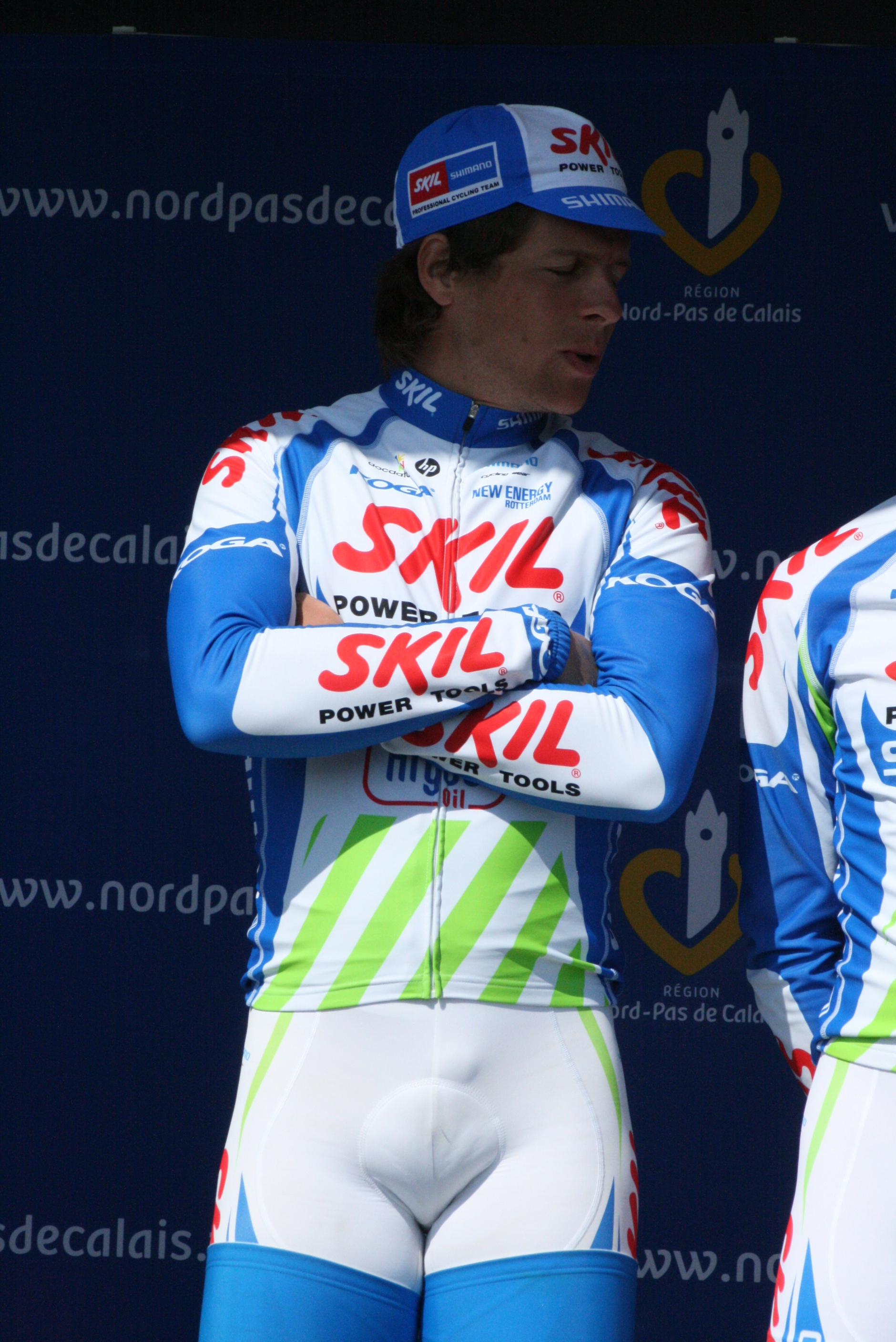 Présentation des coureurs au départ de la première étape Bert De Backer